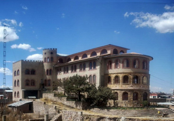 Convento de los Padres franciscanos